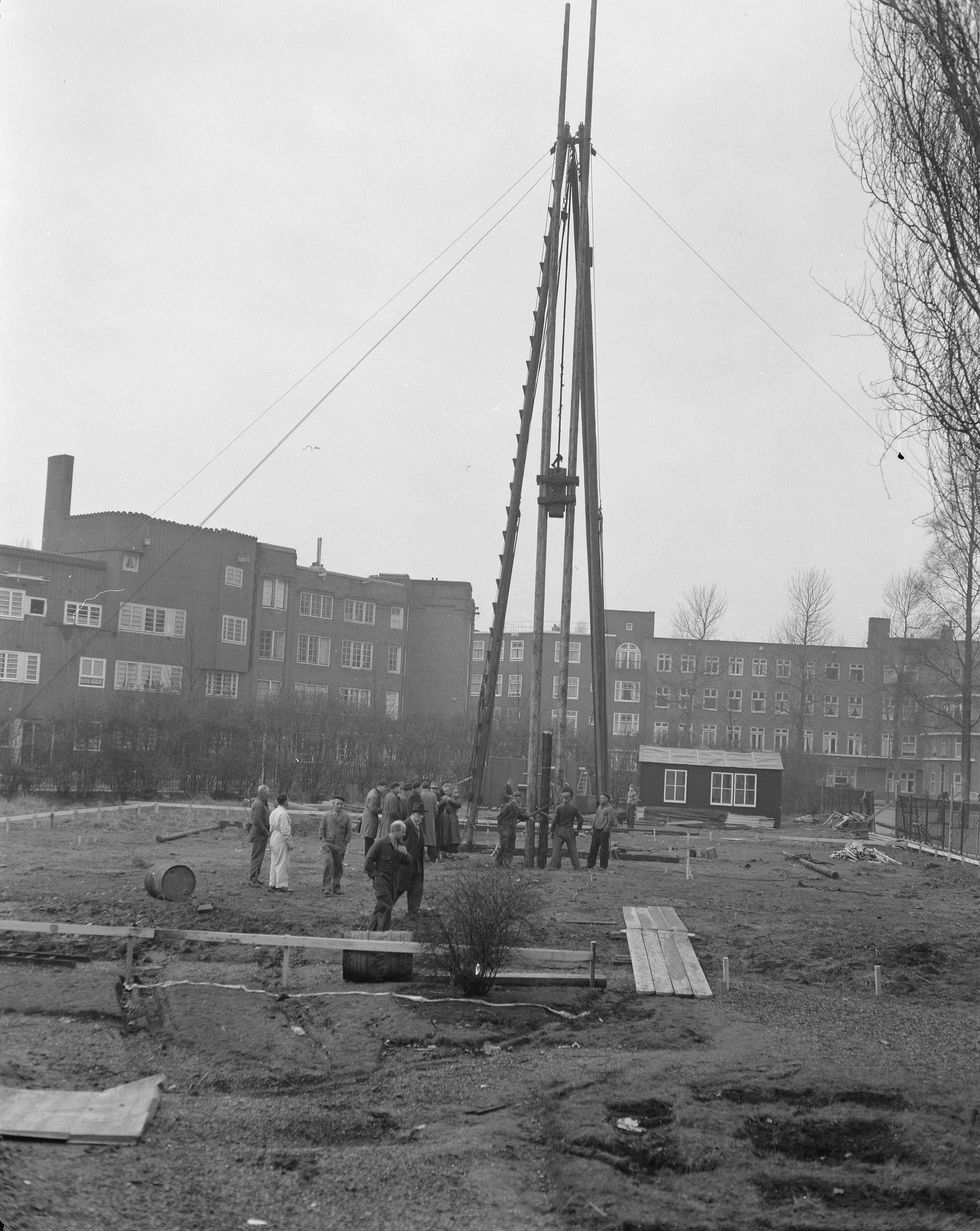 Collectie / Archief : Fotocollectie Anefo Reportage / Serie : [ onbekend ] Beschrijving : Eerste paal voor nieuwe vleugel Centraal Israelisch Ziekenhuis Amsterdam. Dr. M. H. Pimentel als heibaas Datum : 7 januari 1957 Locatie : Amsterdam, Noord-Holland Trefwoorden : ziekenhuizen Persoonsnaam : Dr. M. H. Pimentel Fotograaf : Rossem, Wim van / Anefo Auteursrechthebbende : Nationaal Archief Materiaalsoort : Negatief (zwart/wit) Nummer archiefinventaris : bekijk toegang 2.24.01.04 Bestanddeelnummer : 908-2255 Reacties Geplaatst door Maaike op 08 juni 2013 - 13:40. Centraal Israëlitisch Ziekenhuis Persoonsnamen / Instellingsnamen: Centraal Israëlitische Ziekenverpleging (CIZ) NB. Deze nieuwe vleugel werd gebouwd aan de Frans van Mierisstraat en was verbonden met het hoofdgebouw aan de Jacob Obrechtstraat.